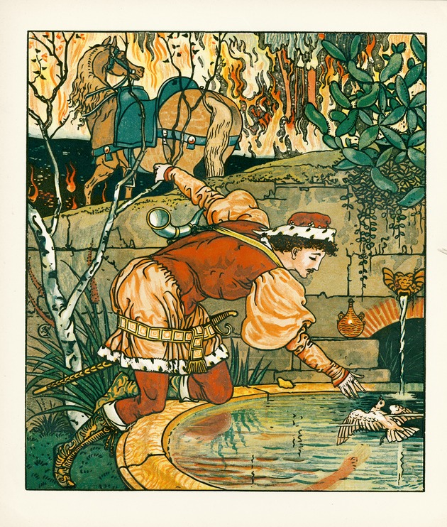 Walter Crane, Princess Belle Etoile, page 7